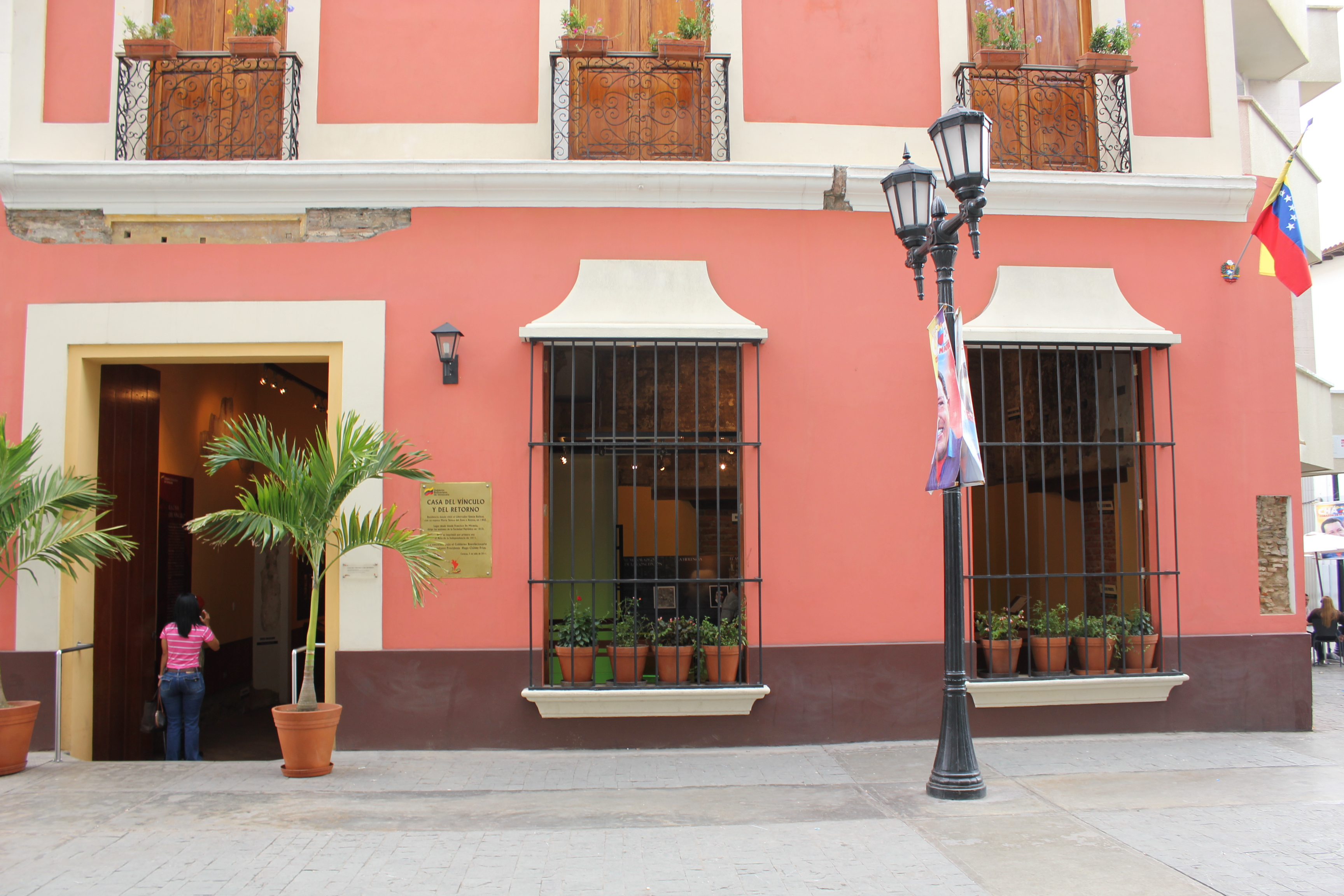 Casa del Vínculo y del Retorno, Caracas, Venezuela.